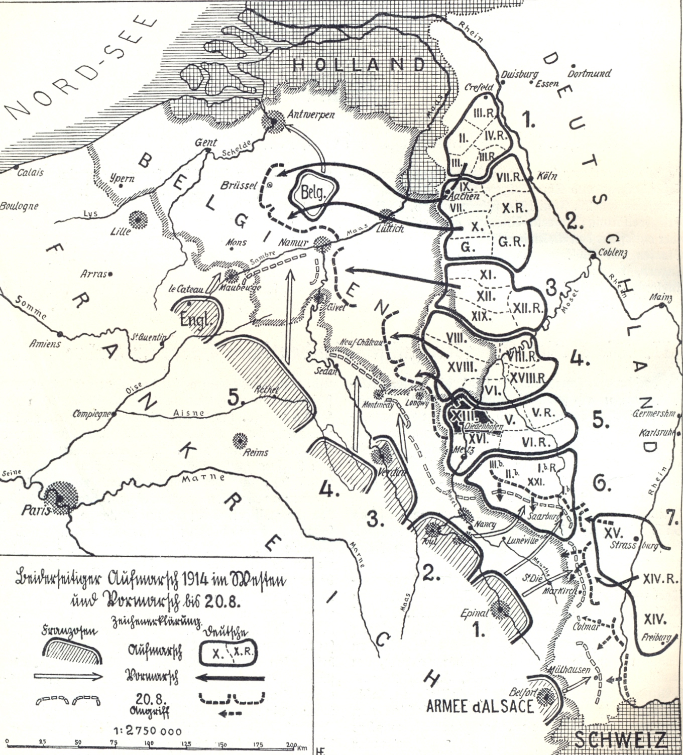 Karte: Beiderseitiger Aufmarsch 1914 im Westen und Vormarsch bis 20.8.